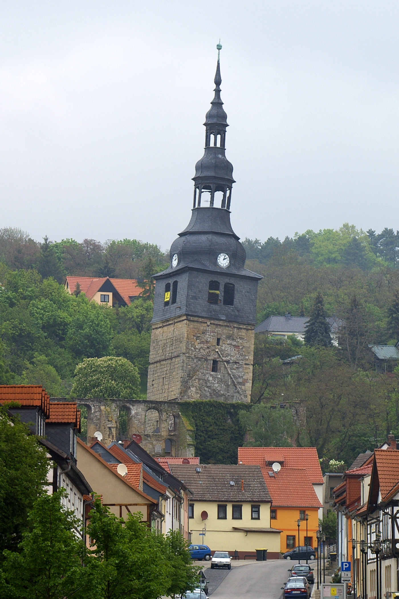 Die Oberkirche in Bad Frankenhausen, Ansicht von der Bornstraße